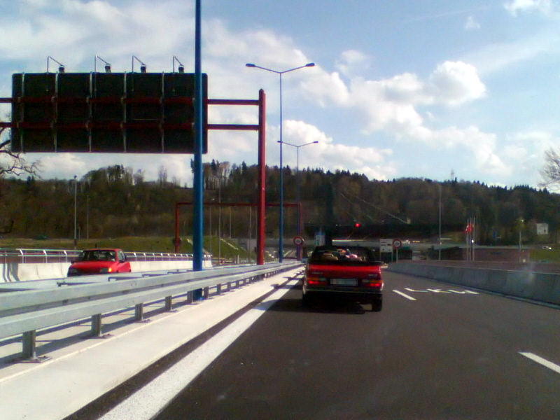 Rheinbrücke A861 Blick in Richtung Zollanlage Rheinfelden Schweiz